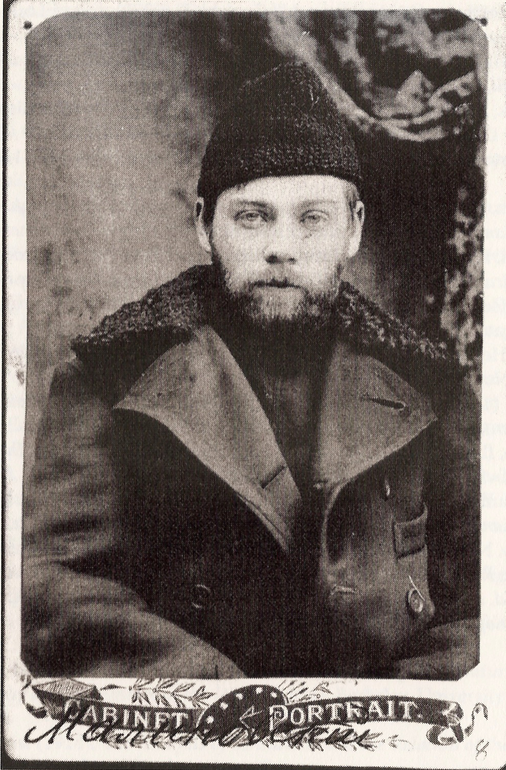 Alexander Bogdanov en 1904